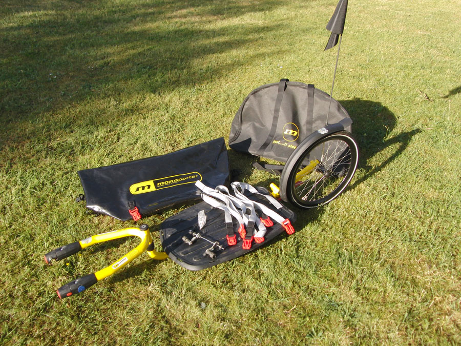 моноколесный прицеп Monoporter фирмы Weber